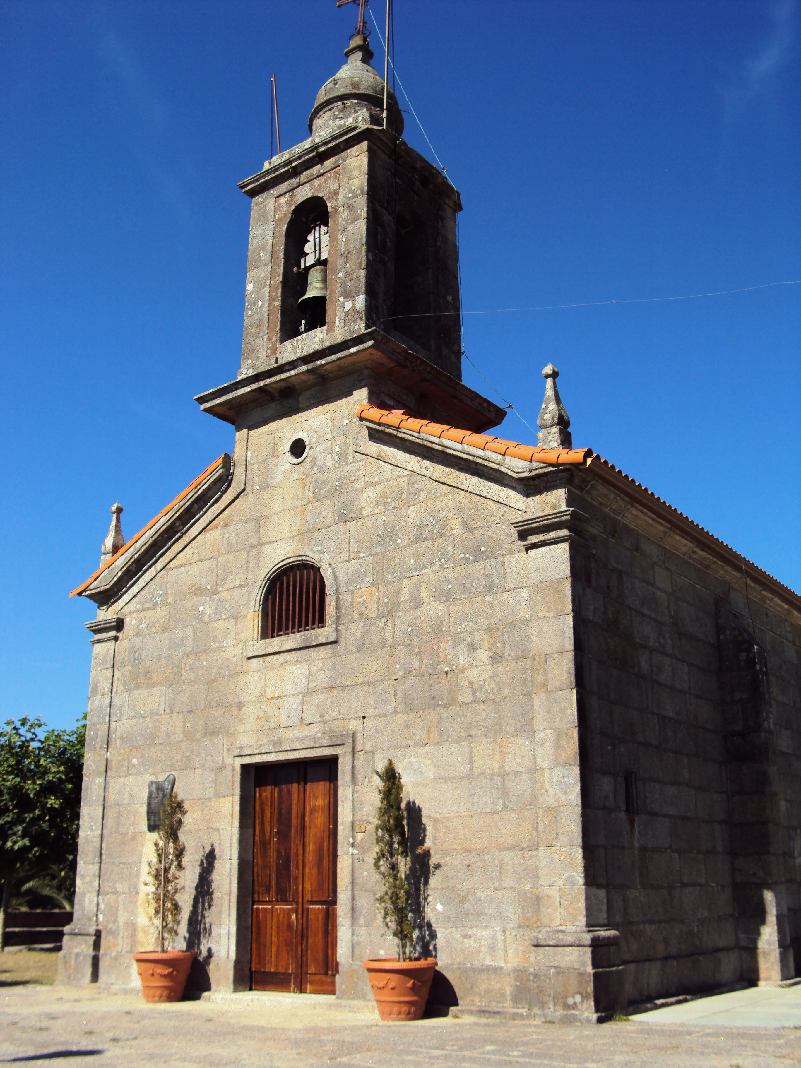 Iglesia parroquial de Santa María de Baredo, Baiona.